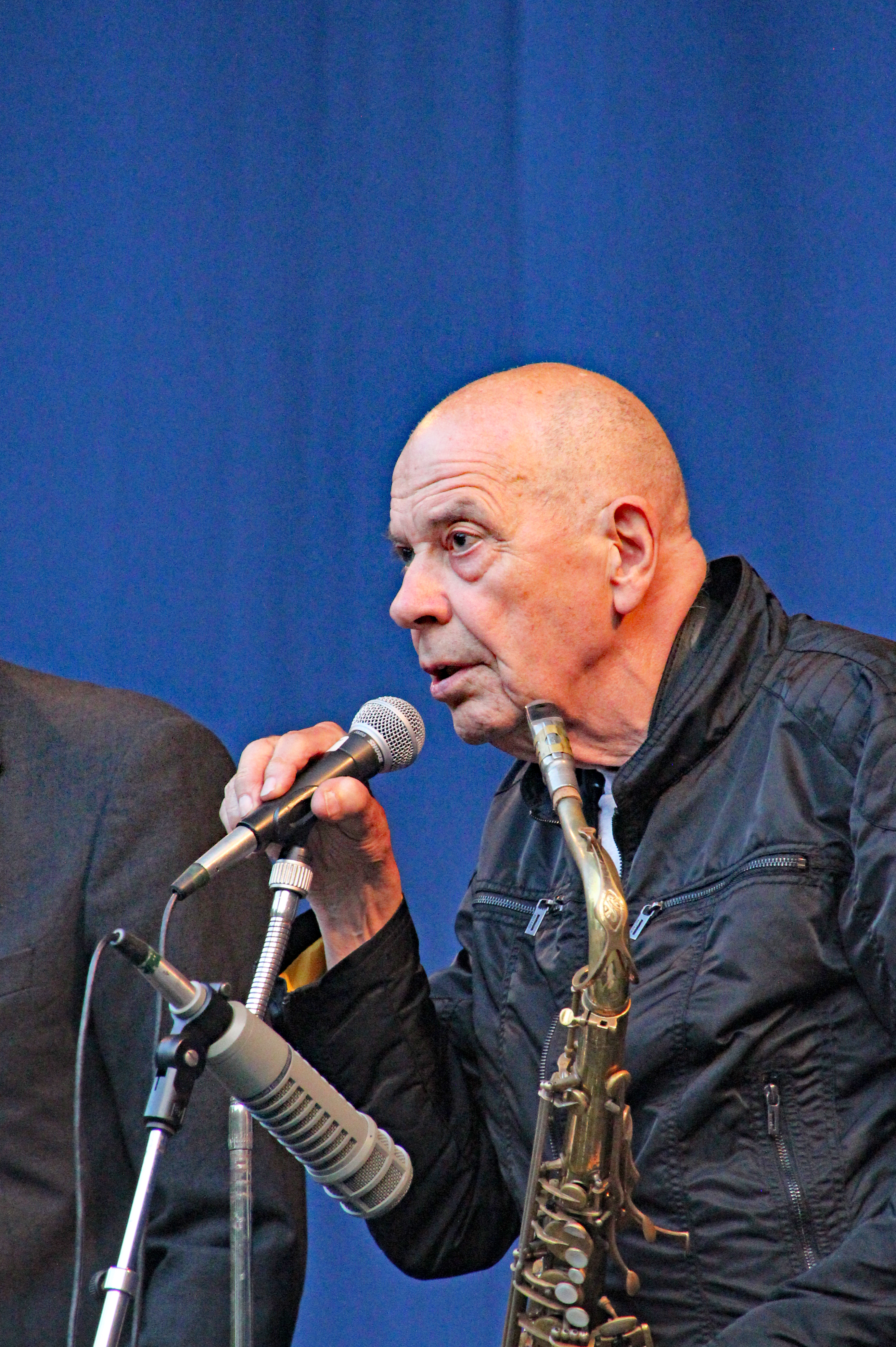 Bildinhalt: Heinz Sauer bei Jazz im Palmengarten Aufnahmeort: Frankfurt am Main, Deutschland Die dargestellte Person wurde bei einem öffentlichen Auftritt fotografiert.